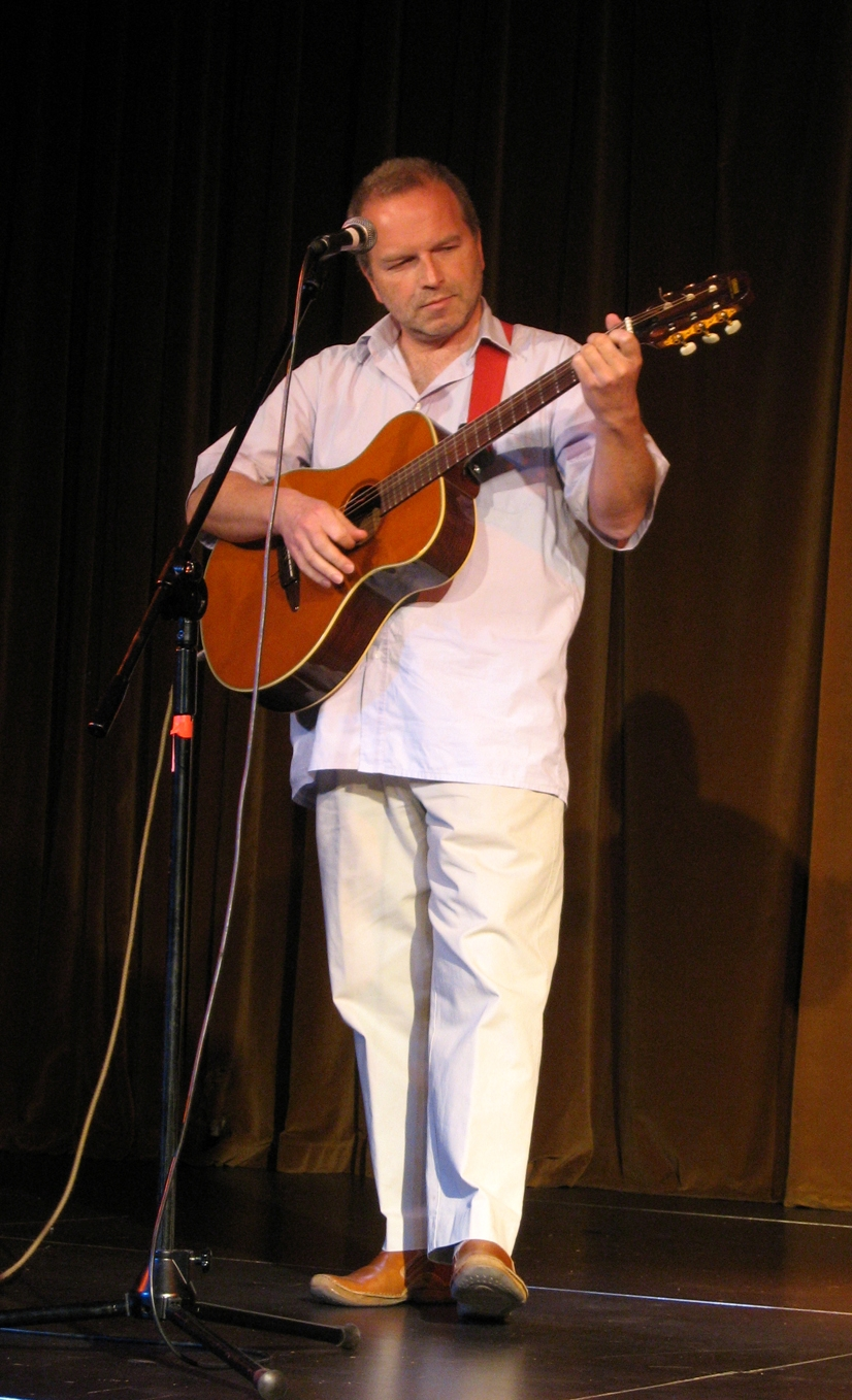 Warszawska Palma 2008 - Piotr Bakal